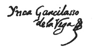 Firma del Inca Garcilaso de la Vega